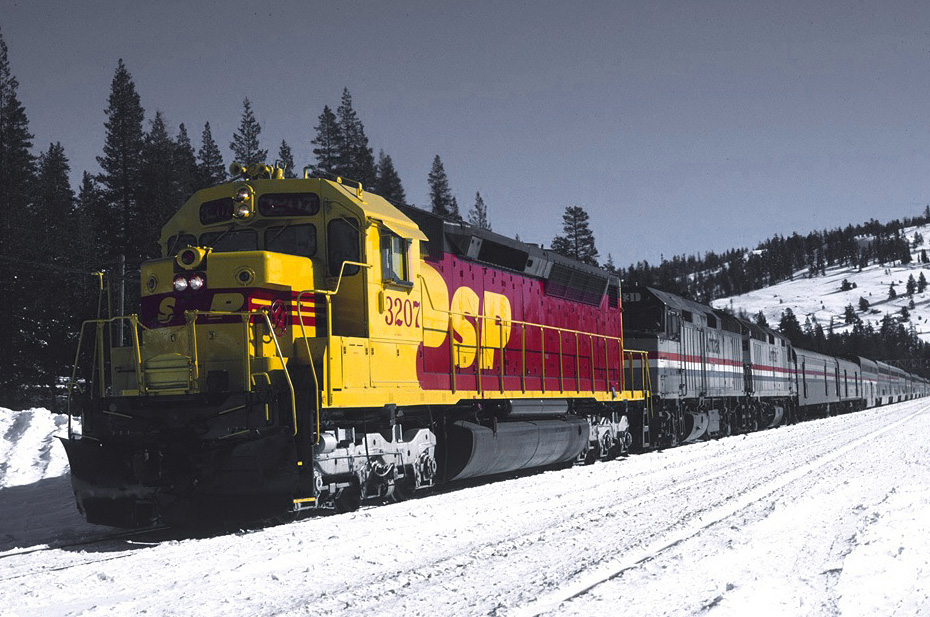 Soda Springs